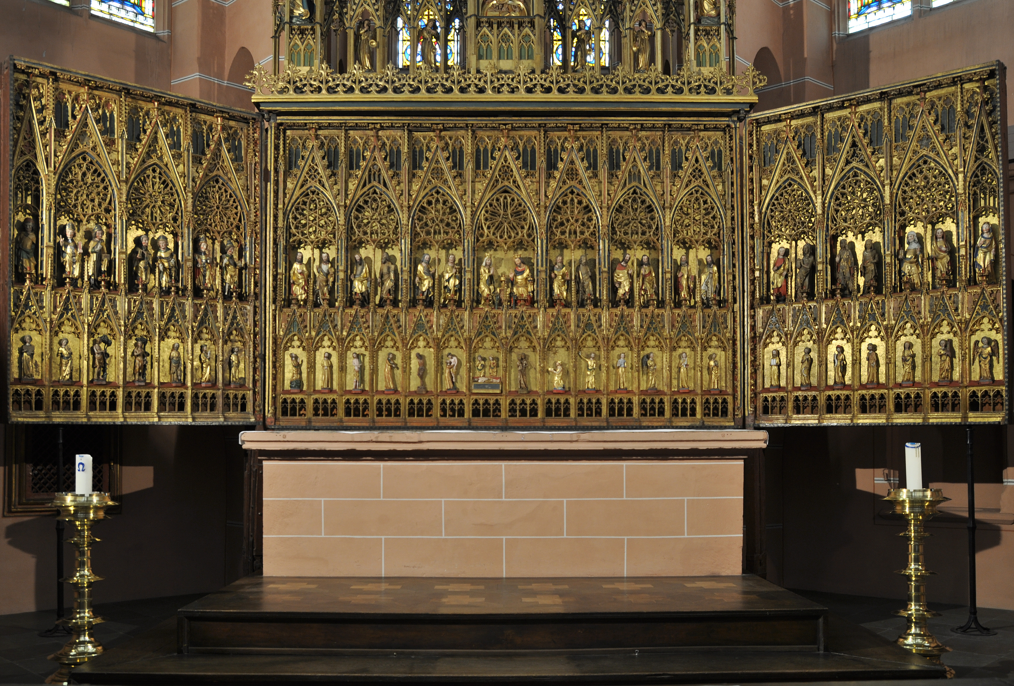 Hochaltar im Chor, erste Hälfte 14. Jh.